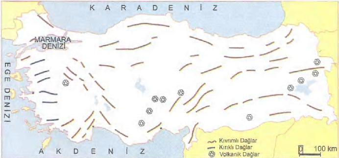 Türkiye'nin Dağları